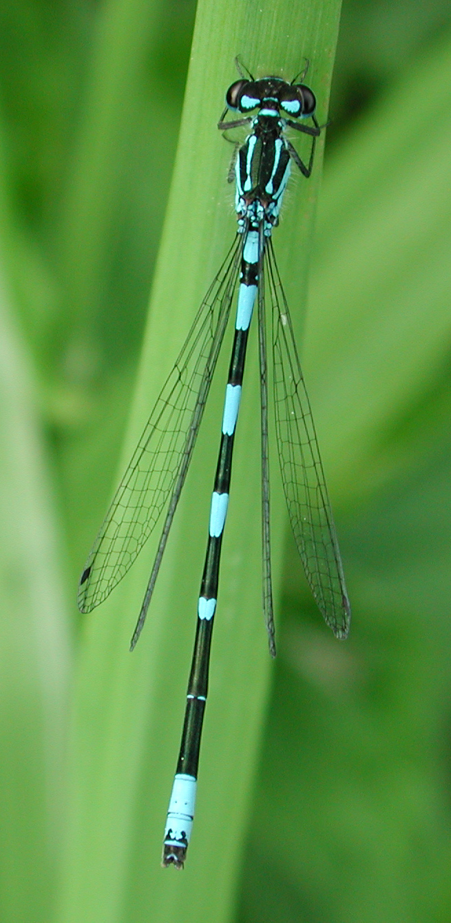 Beschreibung: Fledermaus-Azurjungfer, Männchen (Coenagrion pulchellum, m.), NSG Kirchwerder Wiesen, Elbmarsch bei Hamburg, Deutschland Date: 25-May-2003 Author: G.-U. Tolkiehn